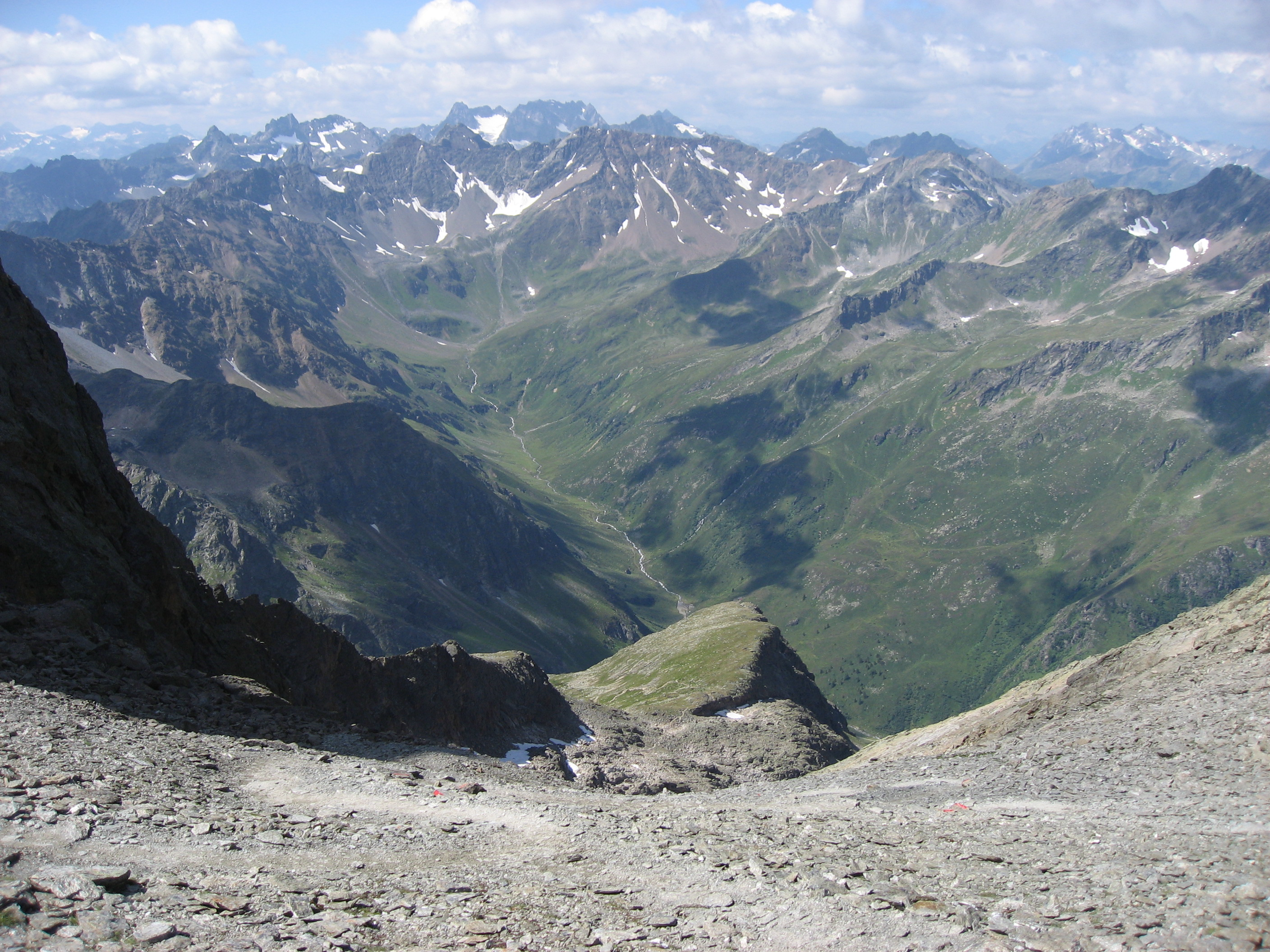 Blick vom Anstieg zum Hohen Riffler ins Malfontal im Verwall